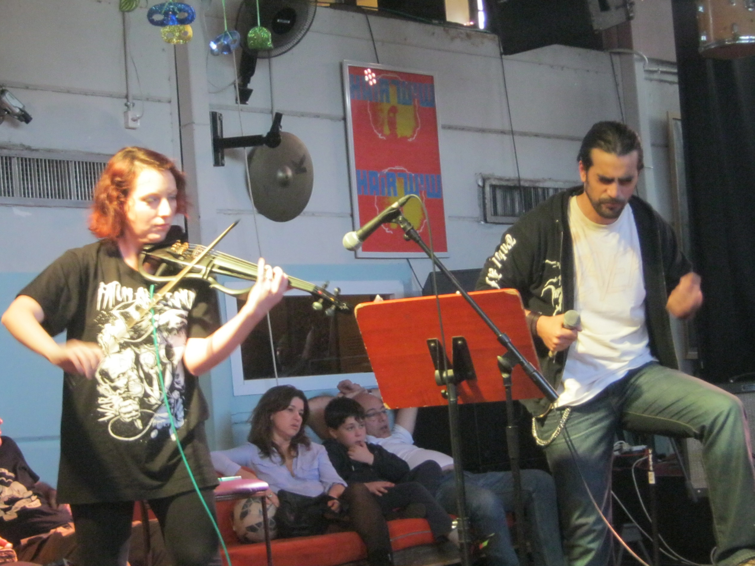 Israel metal musicians Yochai Davidoff and Evelyn Shor (from Fatum Aeternum), 2016